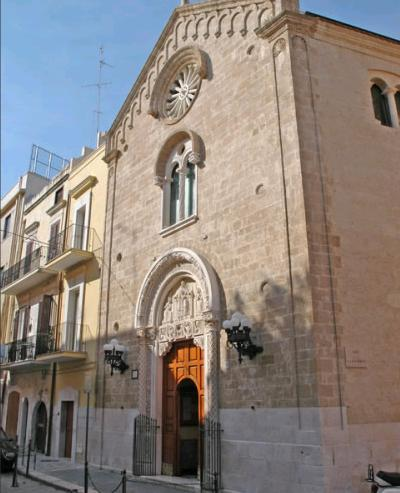 Chiesa di Santa Maria degli Angeli presso il borgo antico di Bari. Licensing Immagine tratta dal sito Bari.live. Autorizzazione all'uso concessa, previa citazione della fonte. OTRS #2007062110004343.